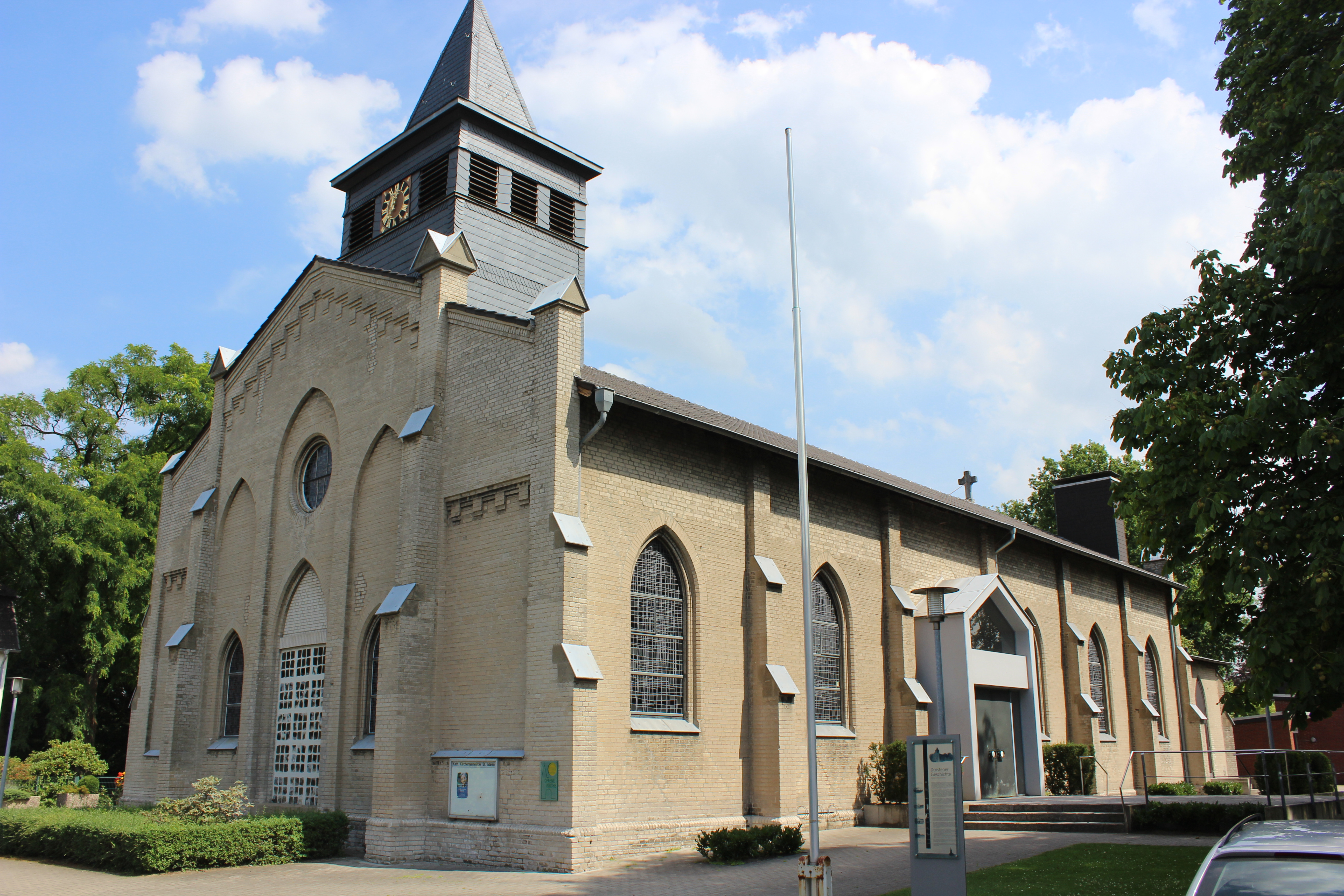 St. Marien in Dorsten-Hervest, Landkreis Recklinghausen, Nordrhein-Westfalen, Deutschland